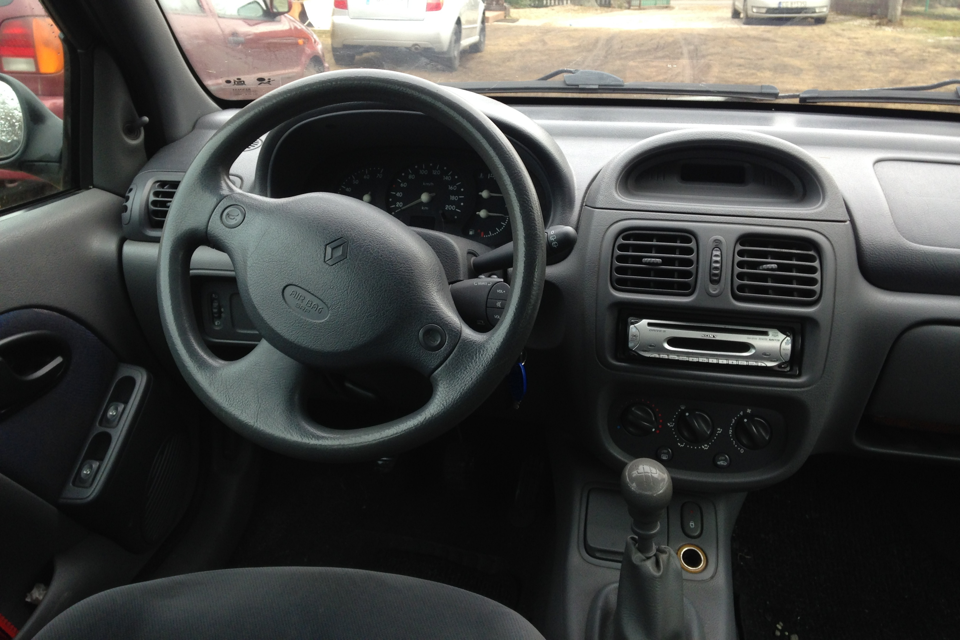 Wnętrze Clio II Phase I